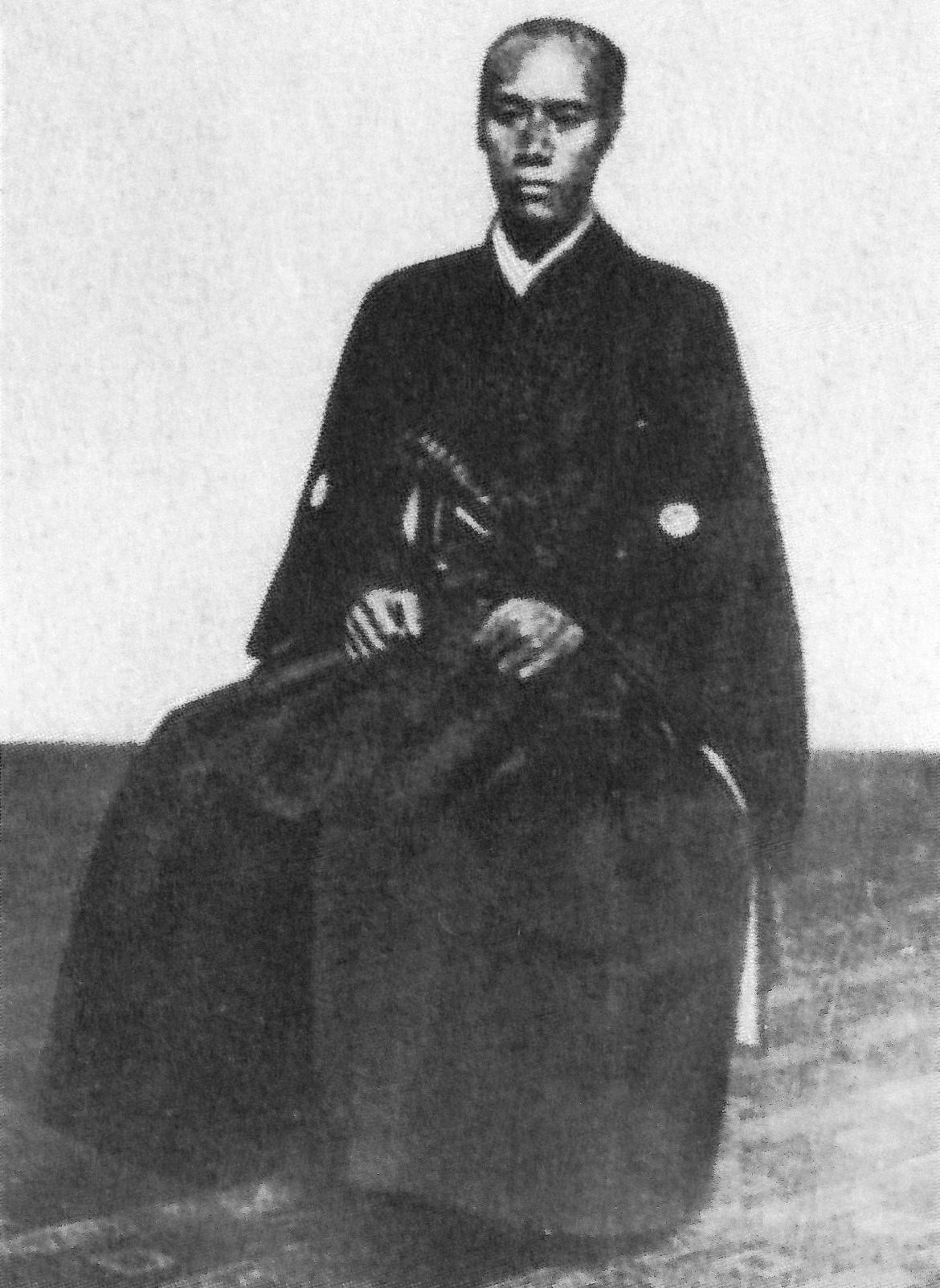 戸沢正実の肖像写真。